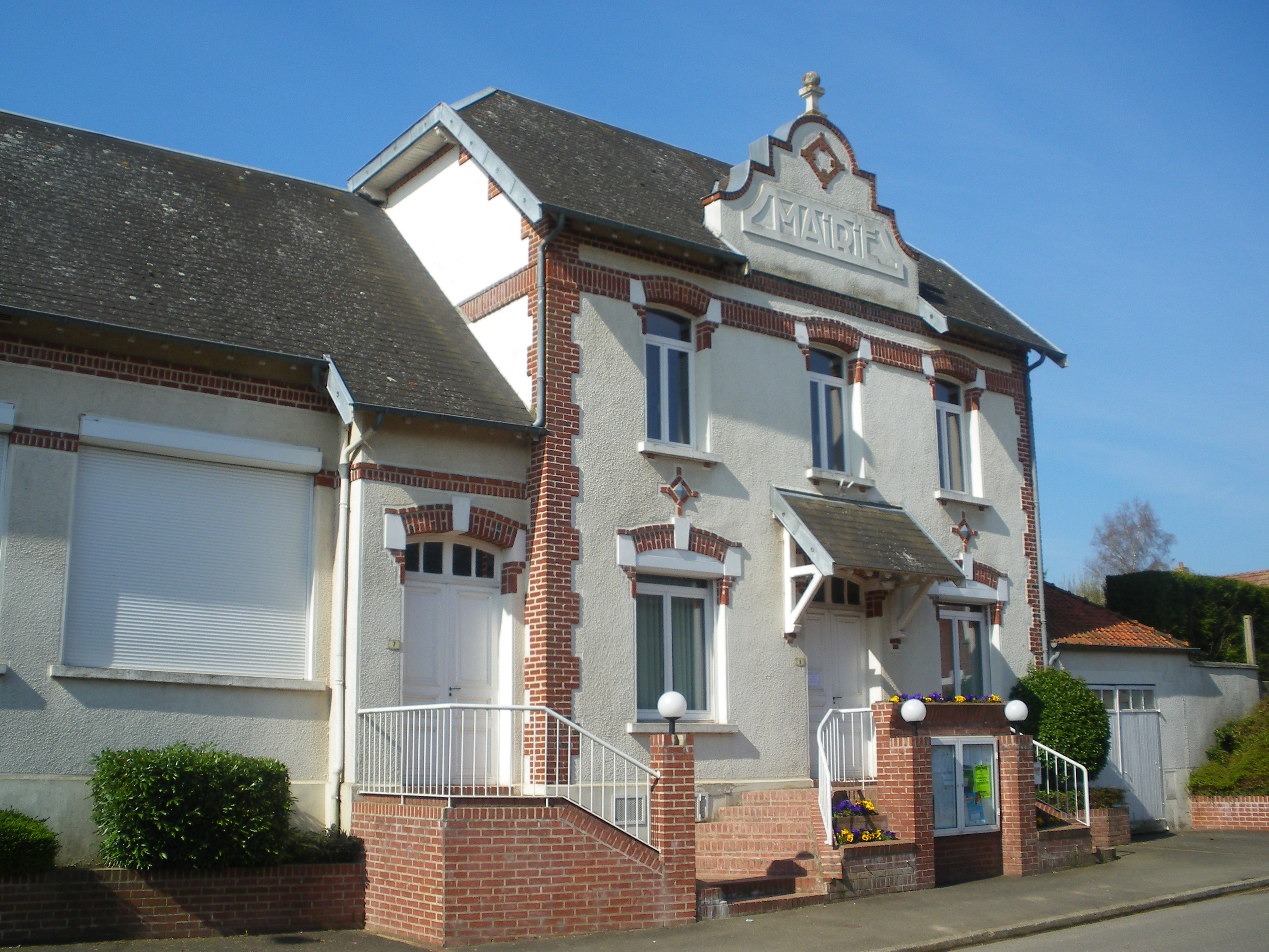 Vue de la mairie de Boisleux-au-Mont.